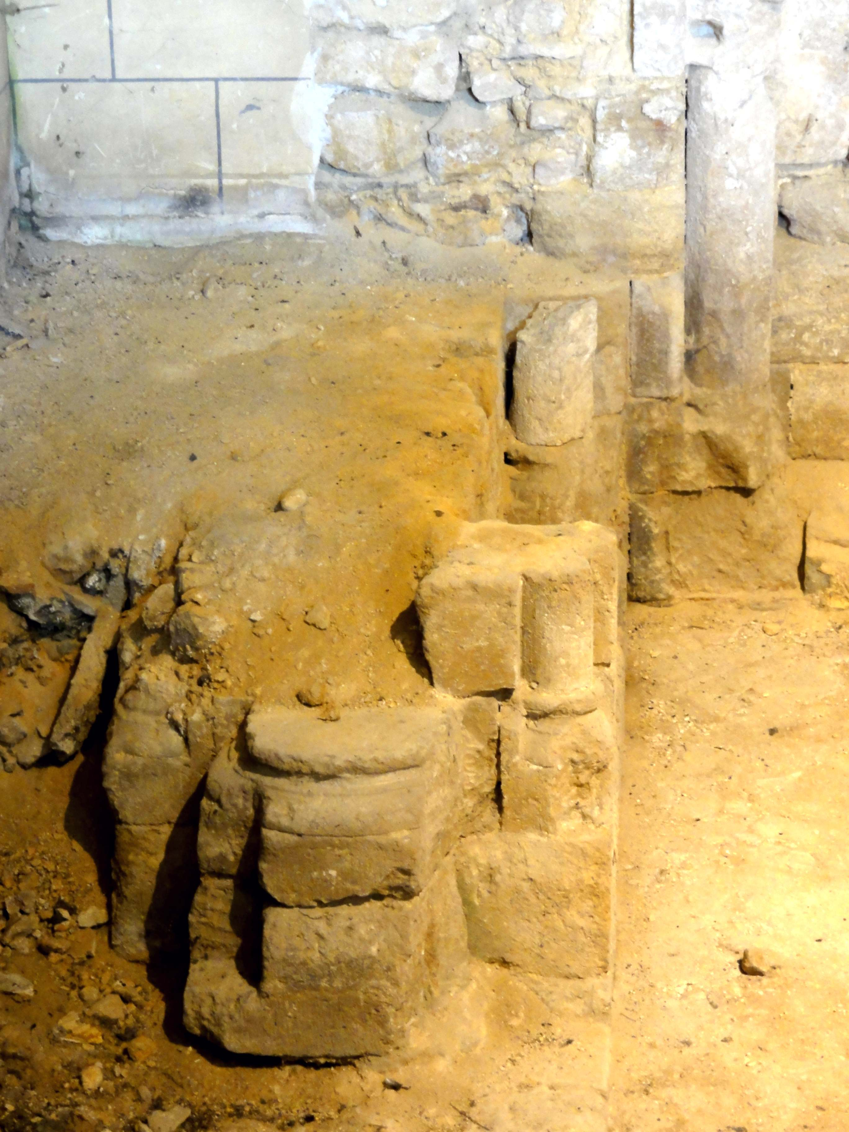 Intérieur de l'église - voir titre.